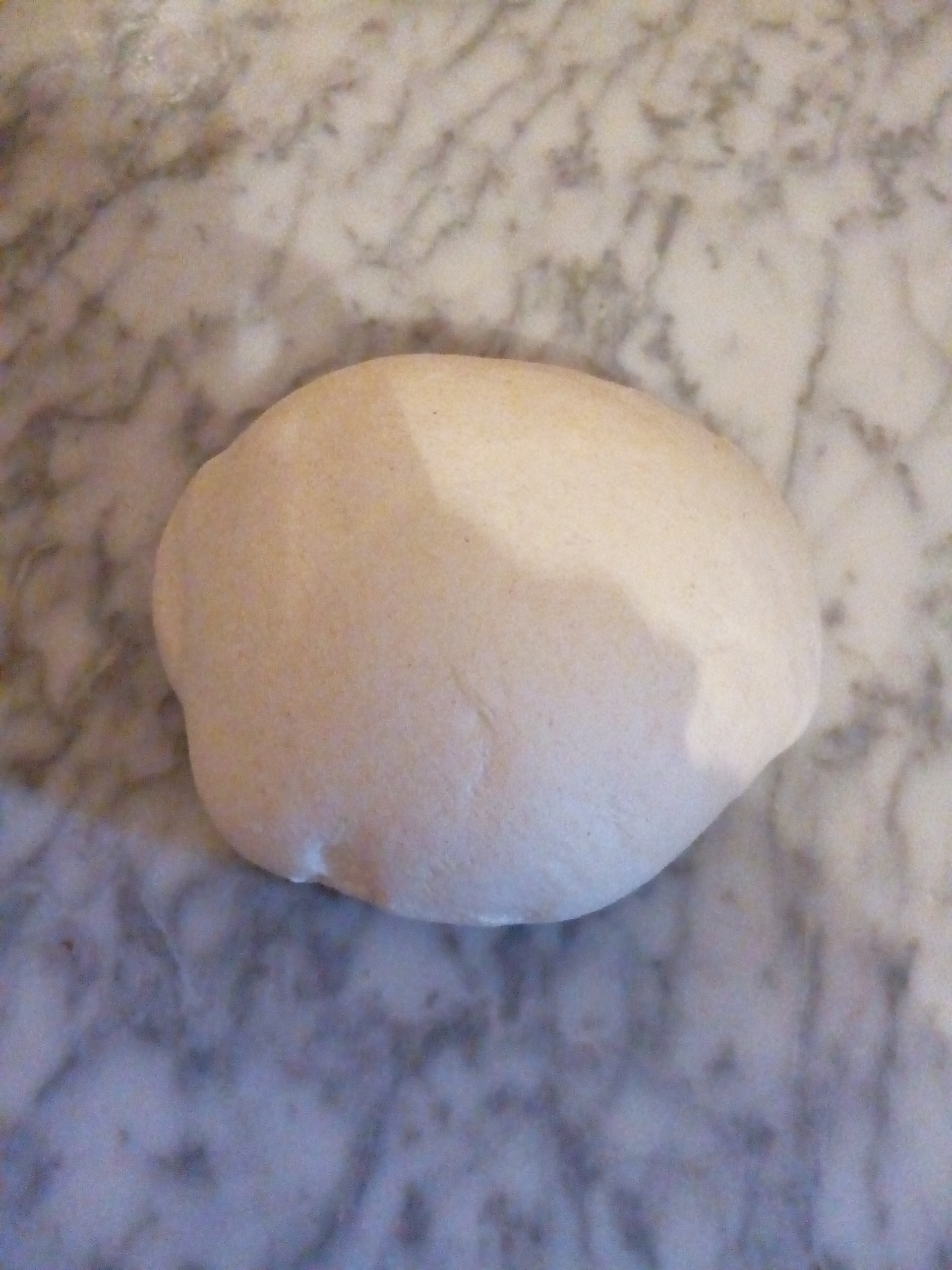 Repas traditionnel